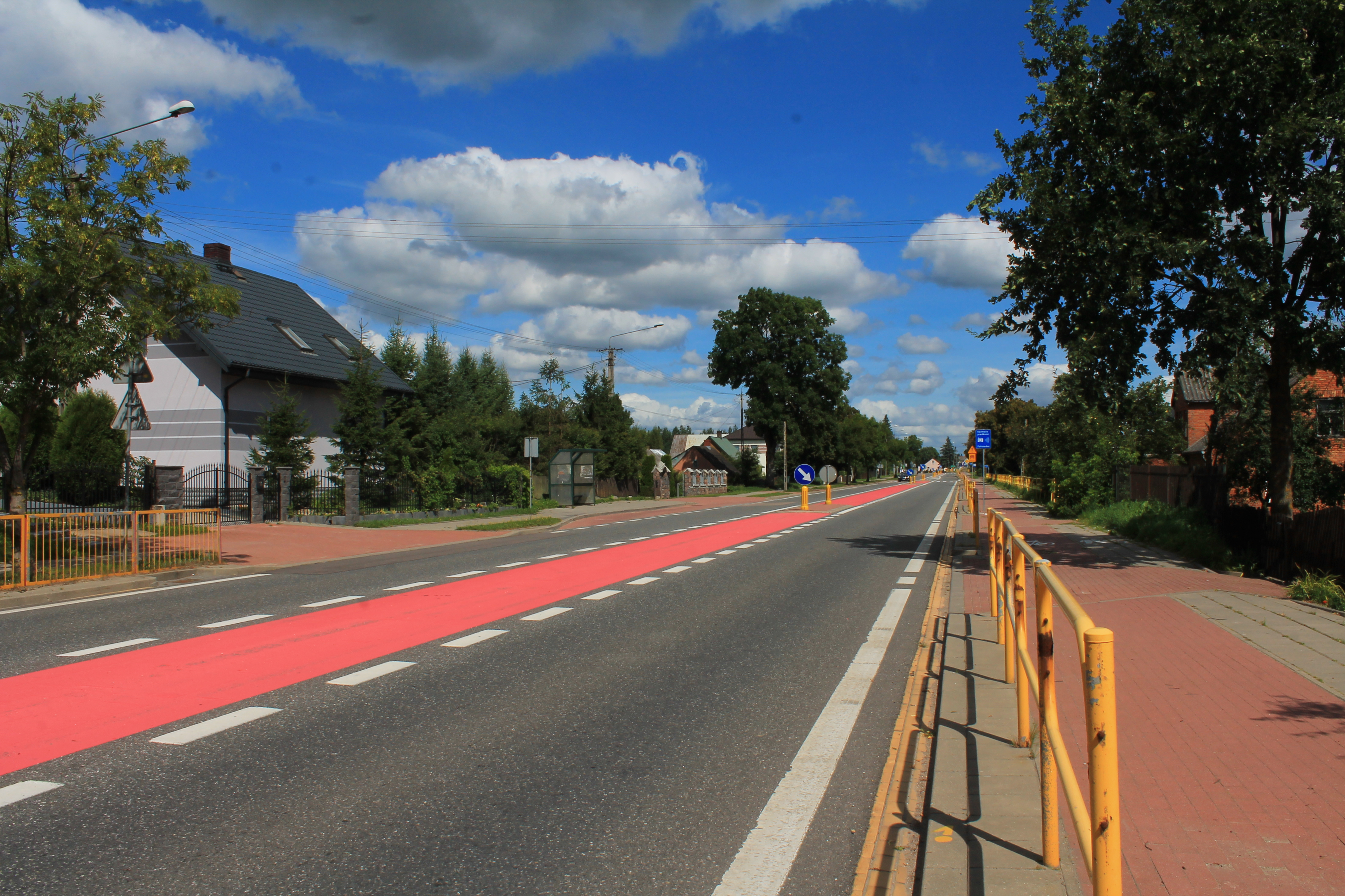 Widok wsi Nowinka, zabudowa wzdłuż drogi wojewódzkiej nr 662 w kierunku Suwałk.